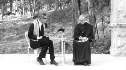 Screenshot del film 8½ (1963)